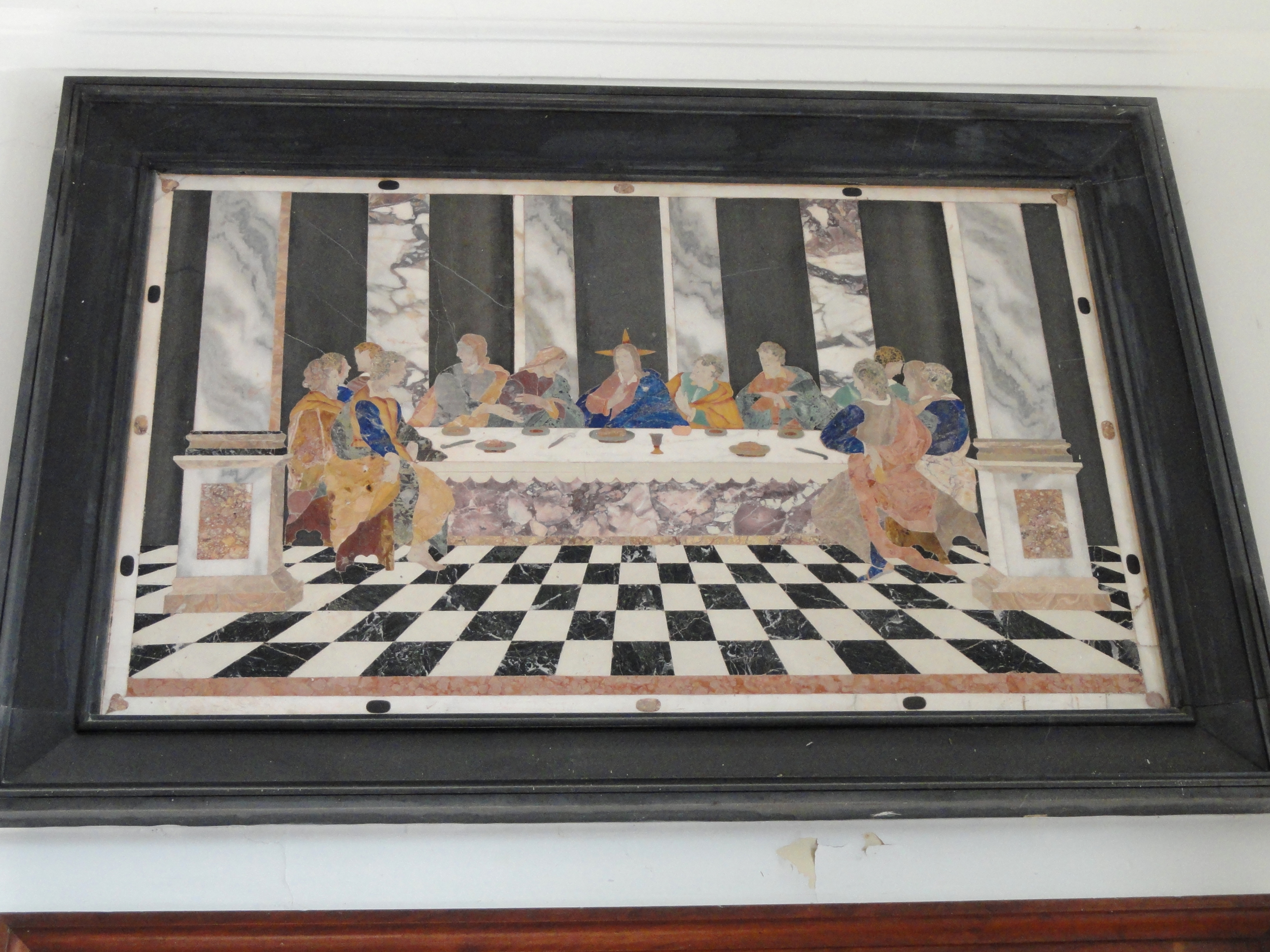 Villa Melzi, Bellagio, Italy.